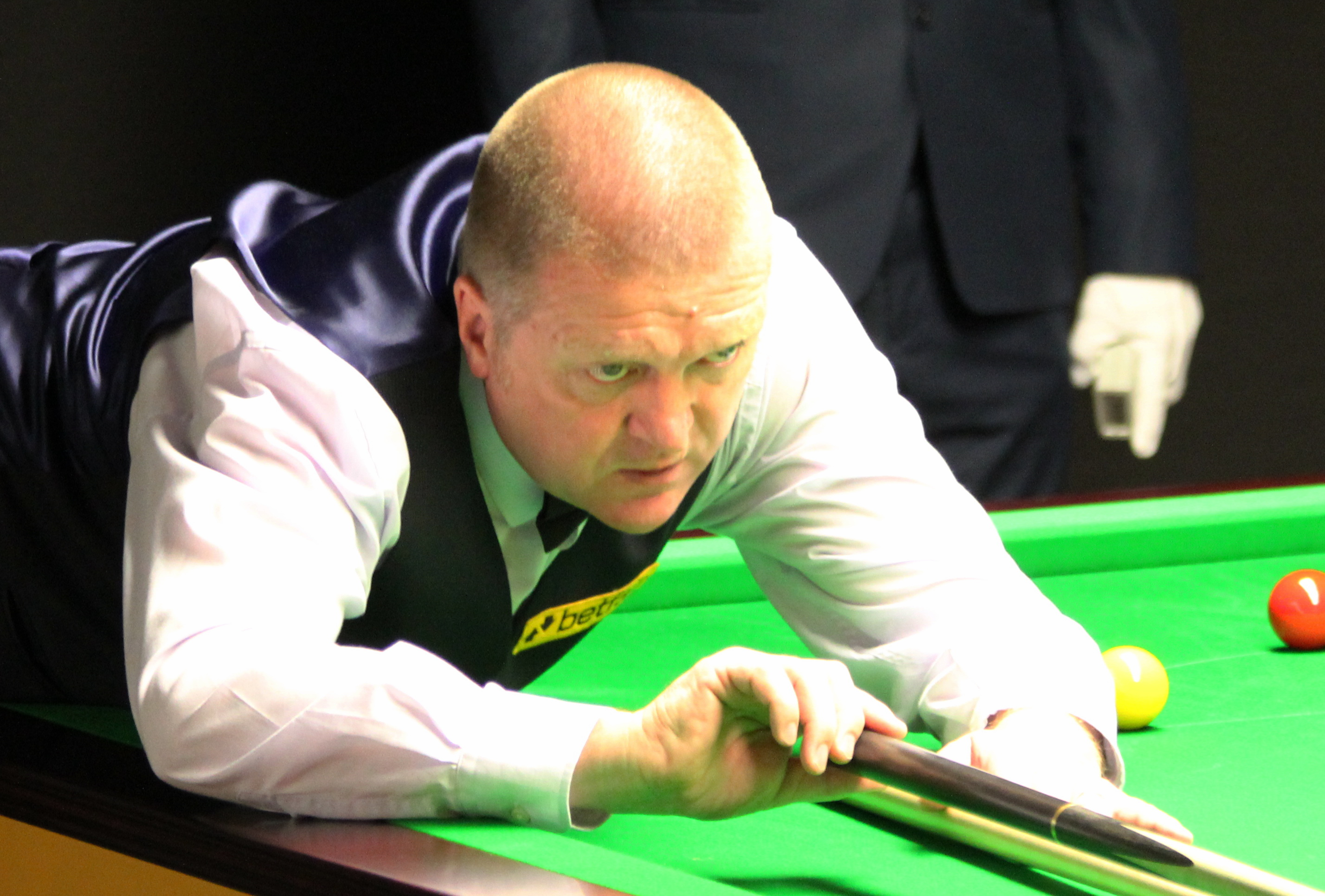 Dave Harold beim Paul Hunter Classic 2012